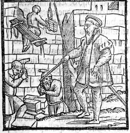 Рисунок из Хроники Перу, 1553